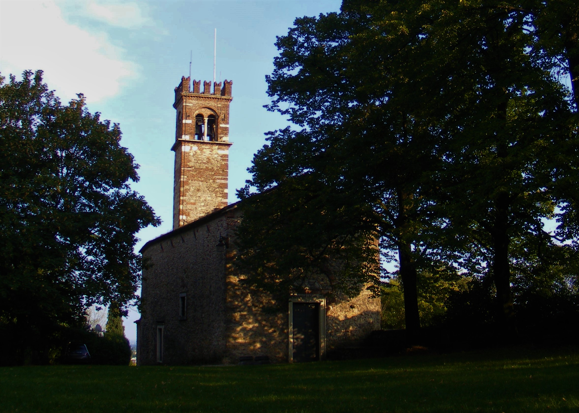 Castello di Schio This is a photo of a monument which is part of cultural heritage of Italy.